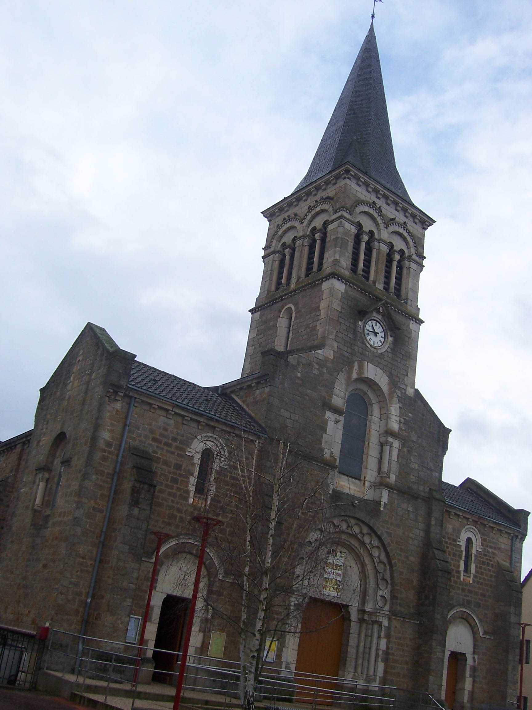 Eglise de Saint-Vallier